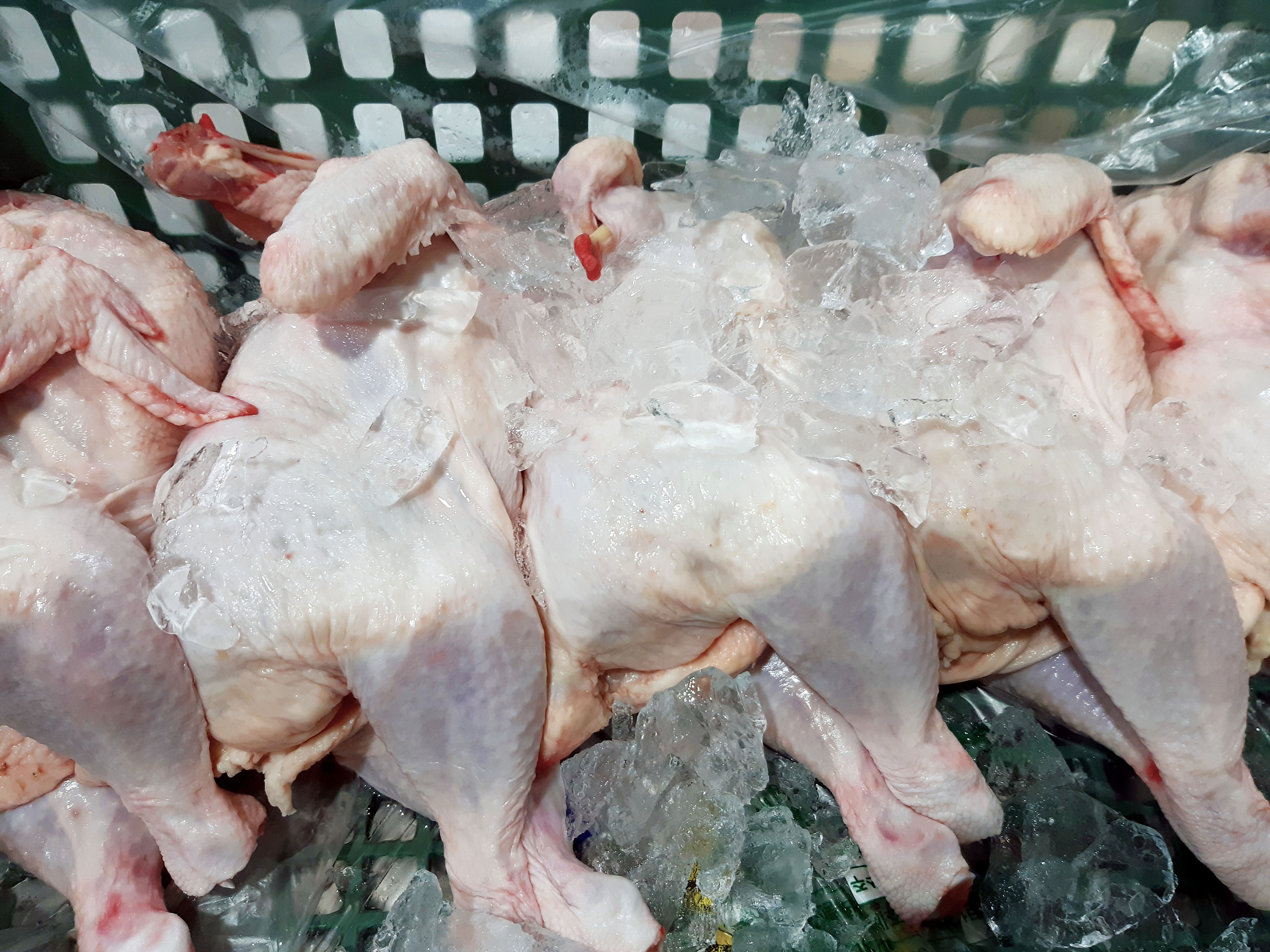 가공전의 생 닭고기입니다.